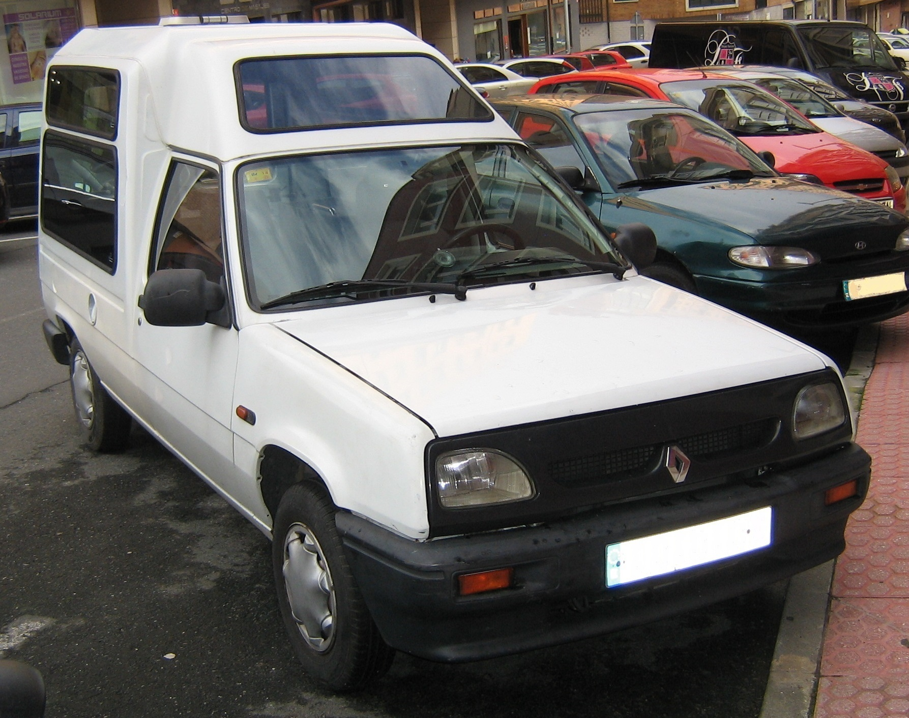 Una furgoneta Renault Express adaptada para el transporte de un minusválido.